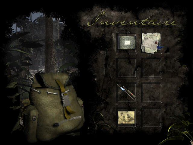 Capture d'écran du jeu vidéo L'Amerzone (1999), développé et édité par Microïds.